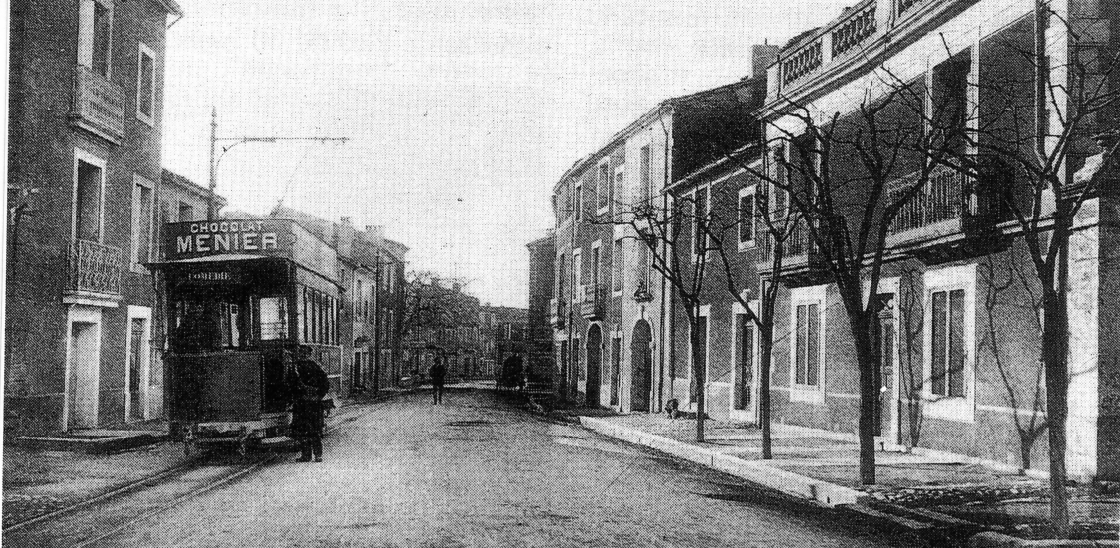 Transports en commun de Montpellier - Celleneuve, terminus - Motrice Brill vue dans les années 1910.